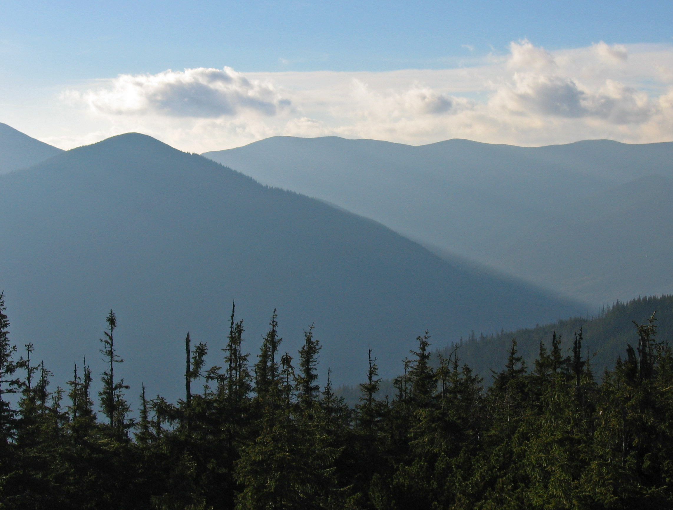 Ліворуч: заказник «Яйківський» (г. Яйко-Перегінське), праворуч: г. Яйко-Ілемське. Рожнятівський район, Мшанське лісництво, кв.35, вид.1-71